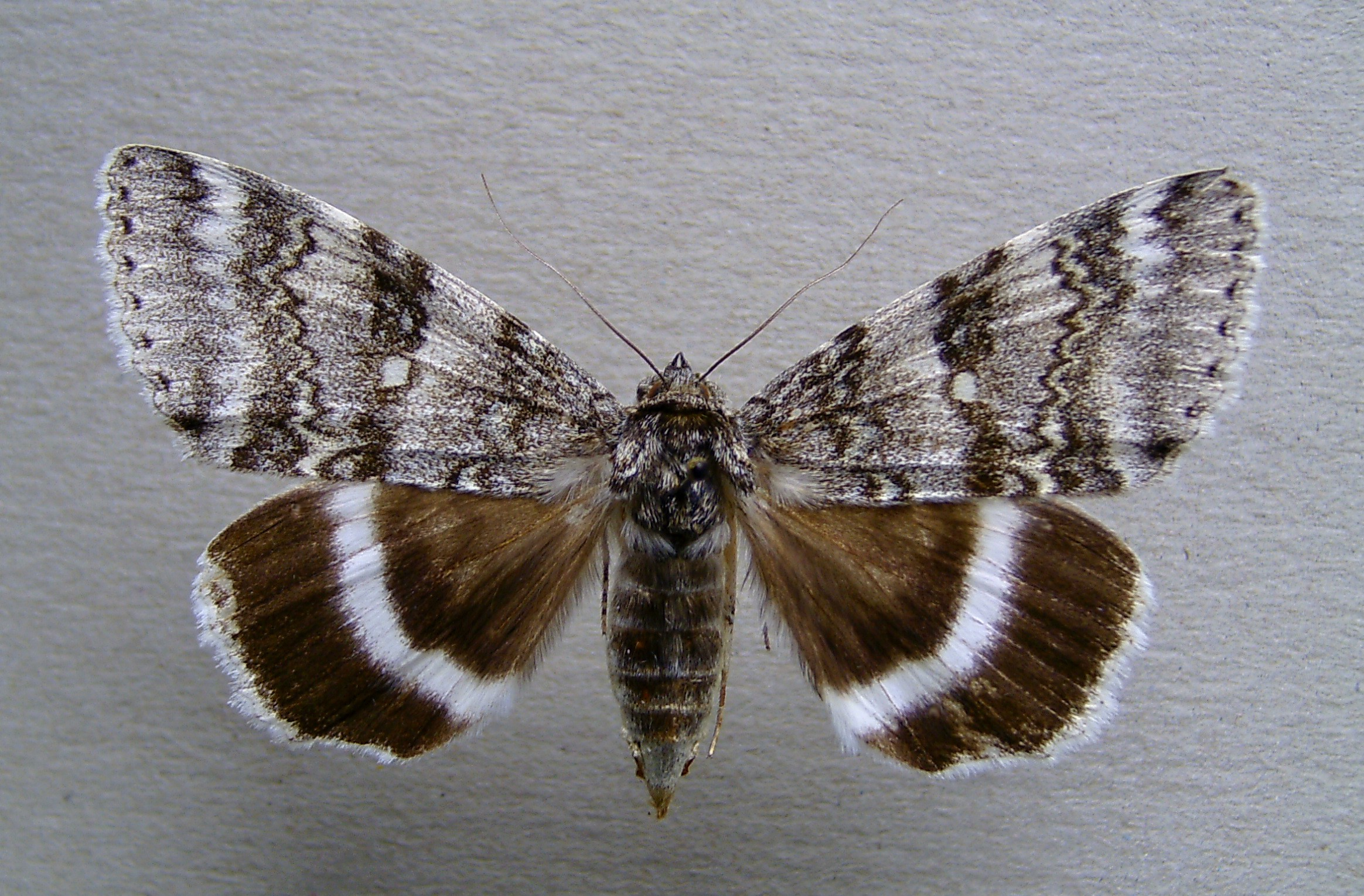 Catocala relicta, Le Granit, Kanada